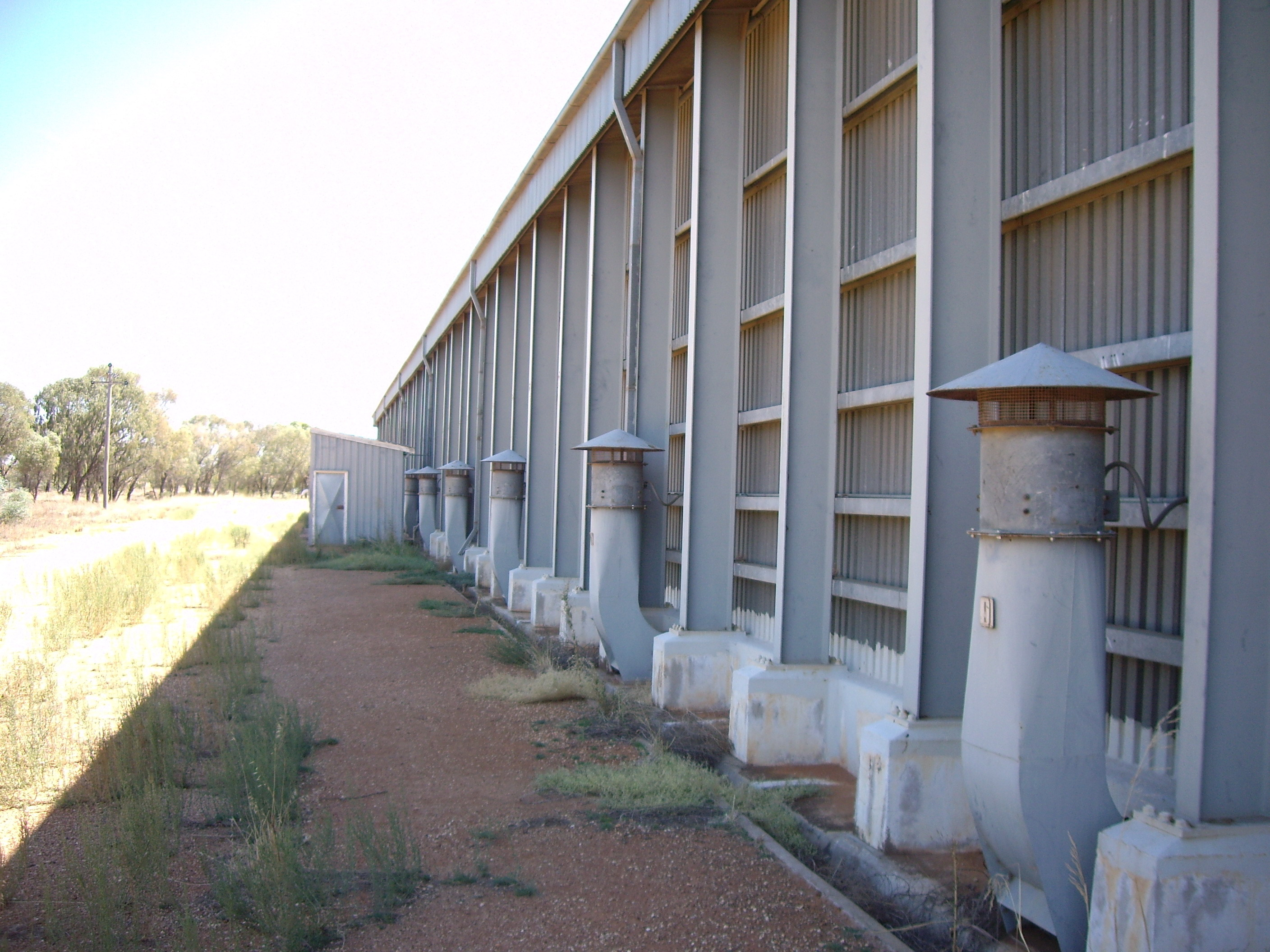 Yulumua Silo 2